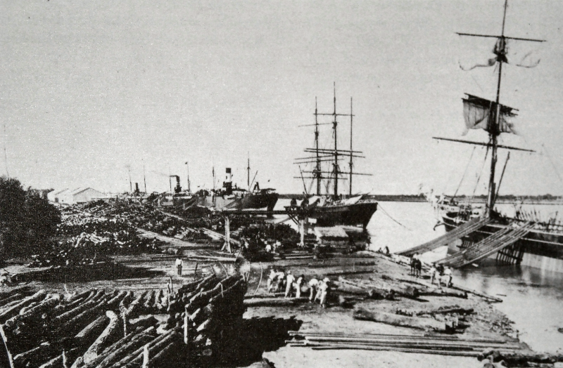 Antiguo puerto de Colastine (puerto de la ciudad de Santa Fe) a principios del Siglo XX.